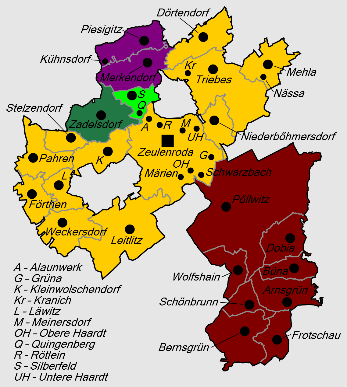 Gliederung der Stadt Zeulenroda-Triebes ab 1. Februar 2006